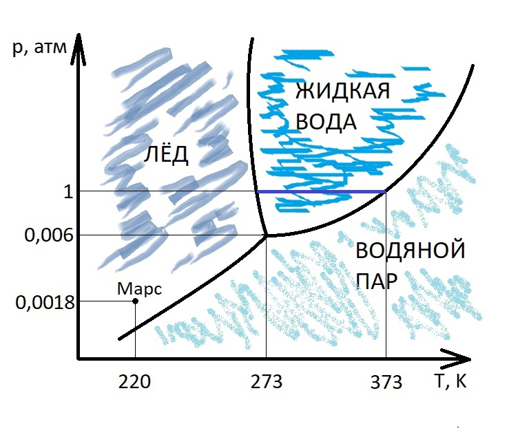 Тройная точка воды и текущие условия на поверхности Марса на фазовой диаграмме воды